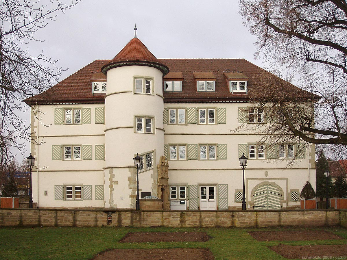 Südansicht vom Wasserschloss in Bad Rappenau, erbaut ab 1601 durch Eberhard von Gemmingen